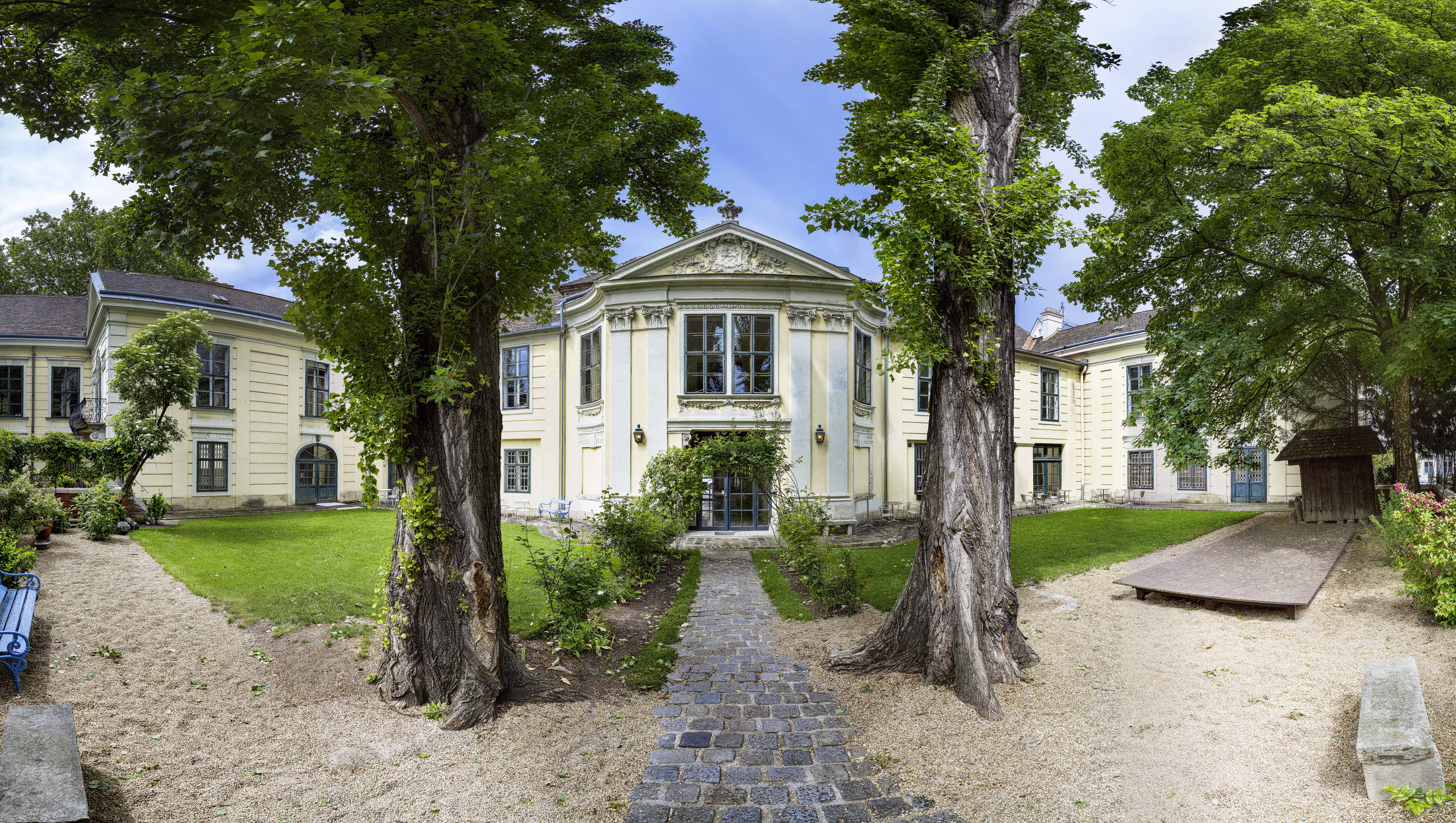 Volkskundemuseum Wien